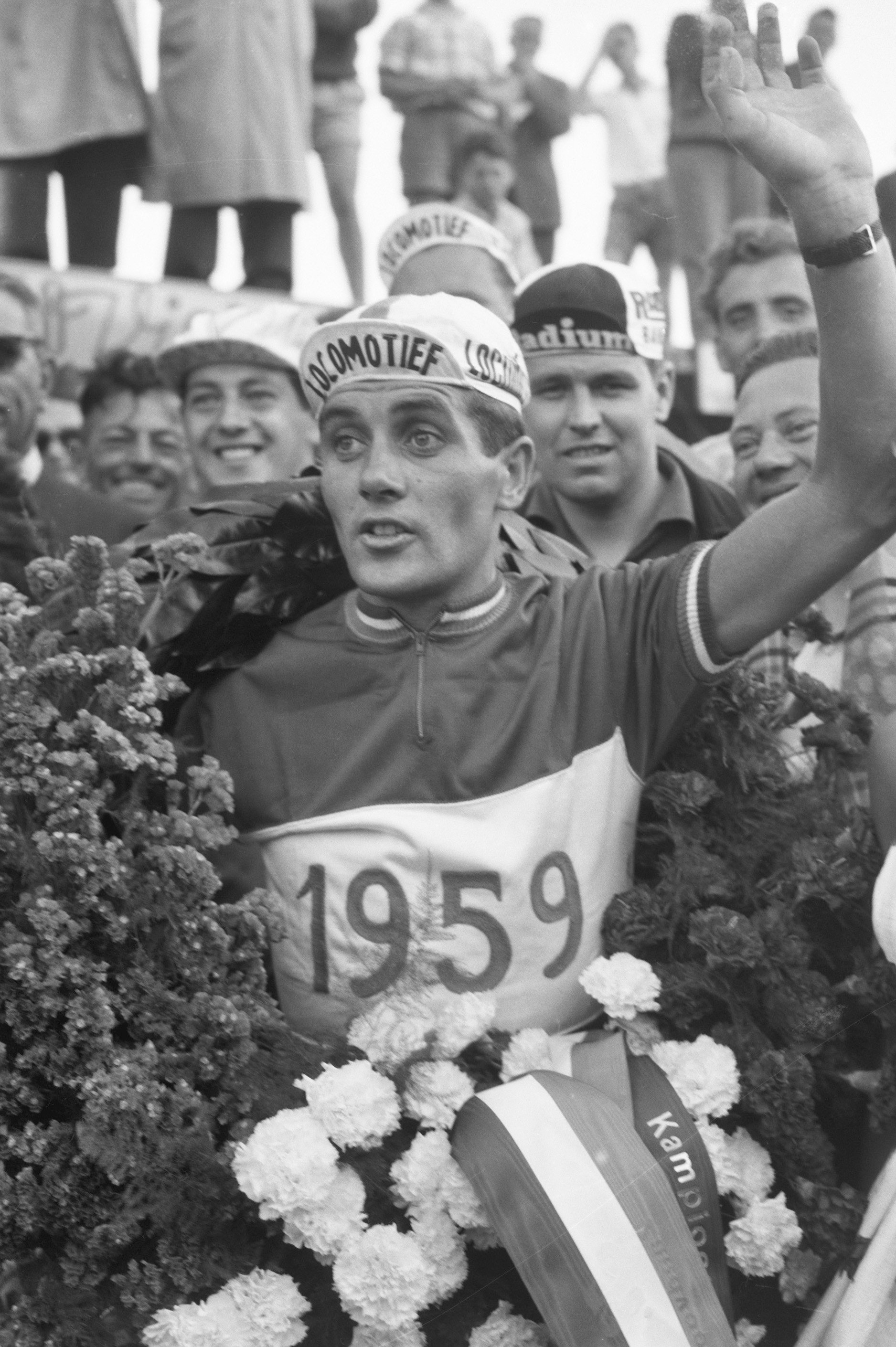 Laatste rit om het kampioenschap van het kampioenschap wielrennen op de weg voor profs op het circuit van Zandvoort, Piet Damen met krans bij de huldiging. Datum 26 juli 1959